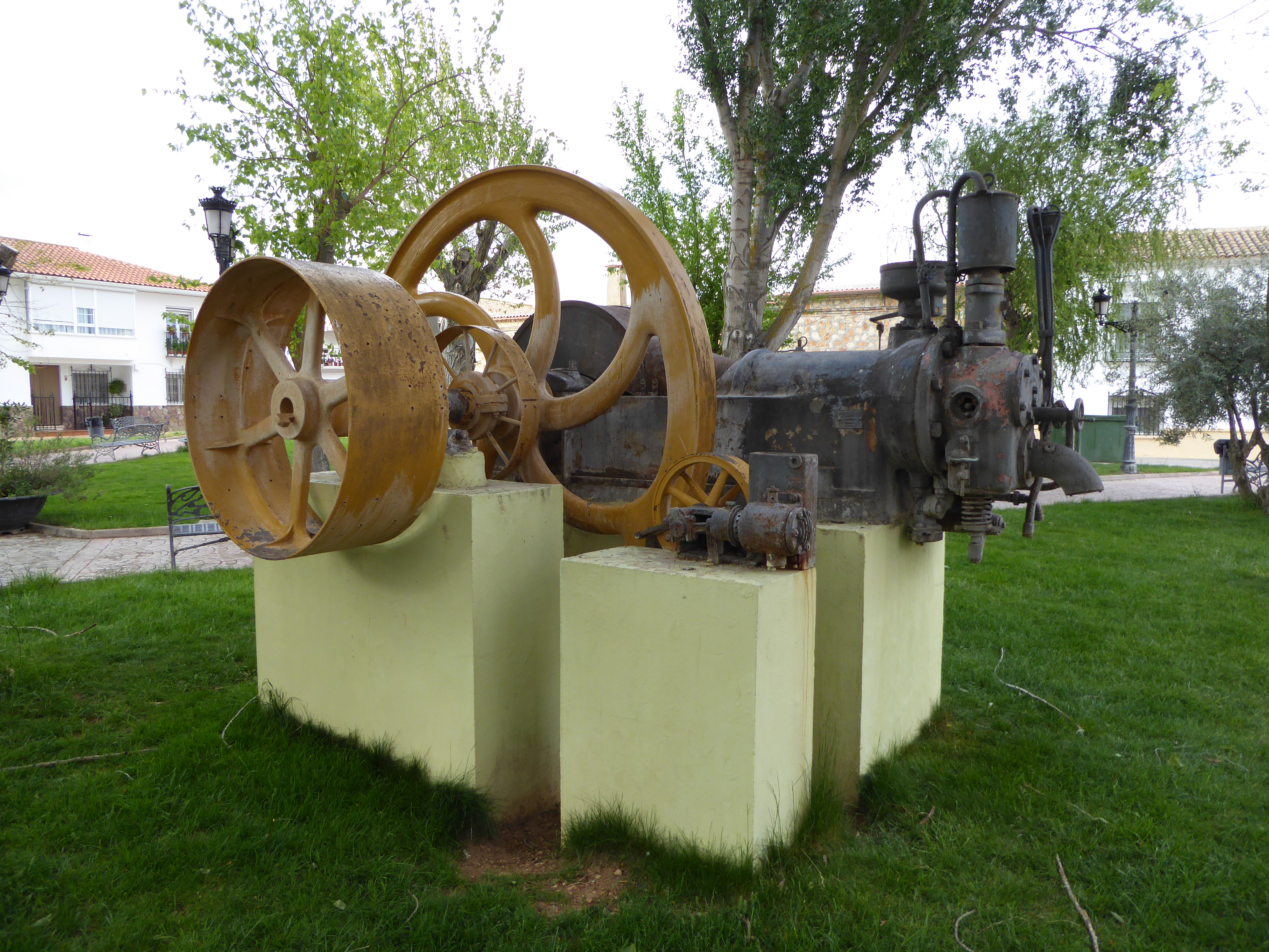 Osa de la Vega